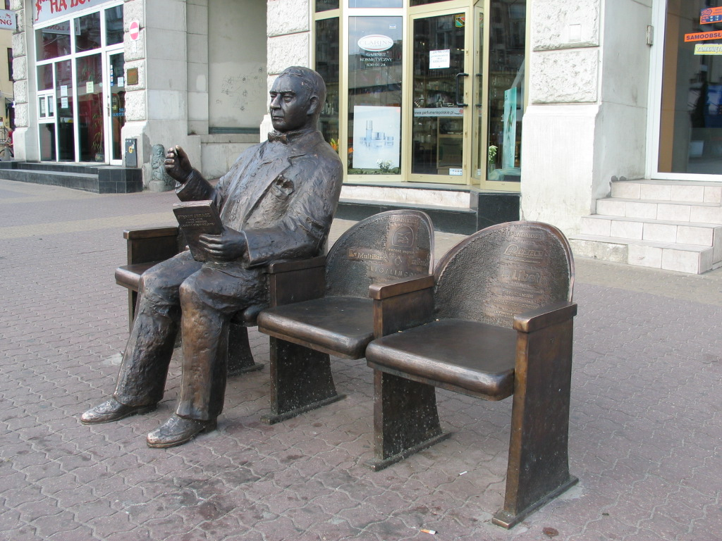 Fotel Stefana Jaracza Łódź